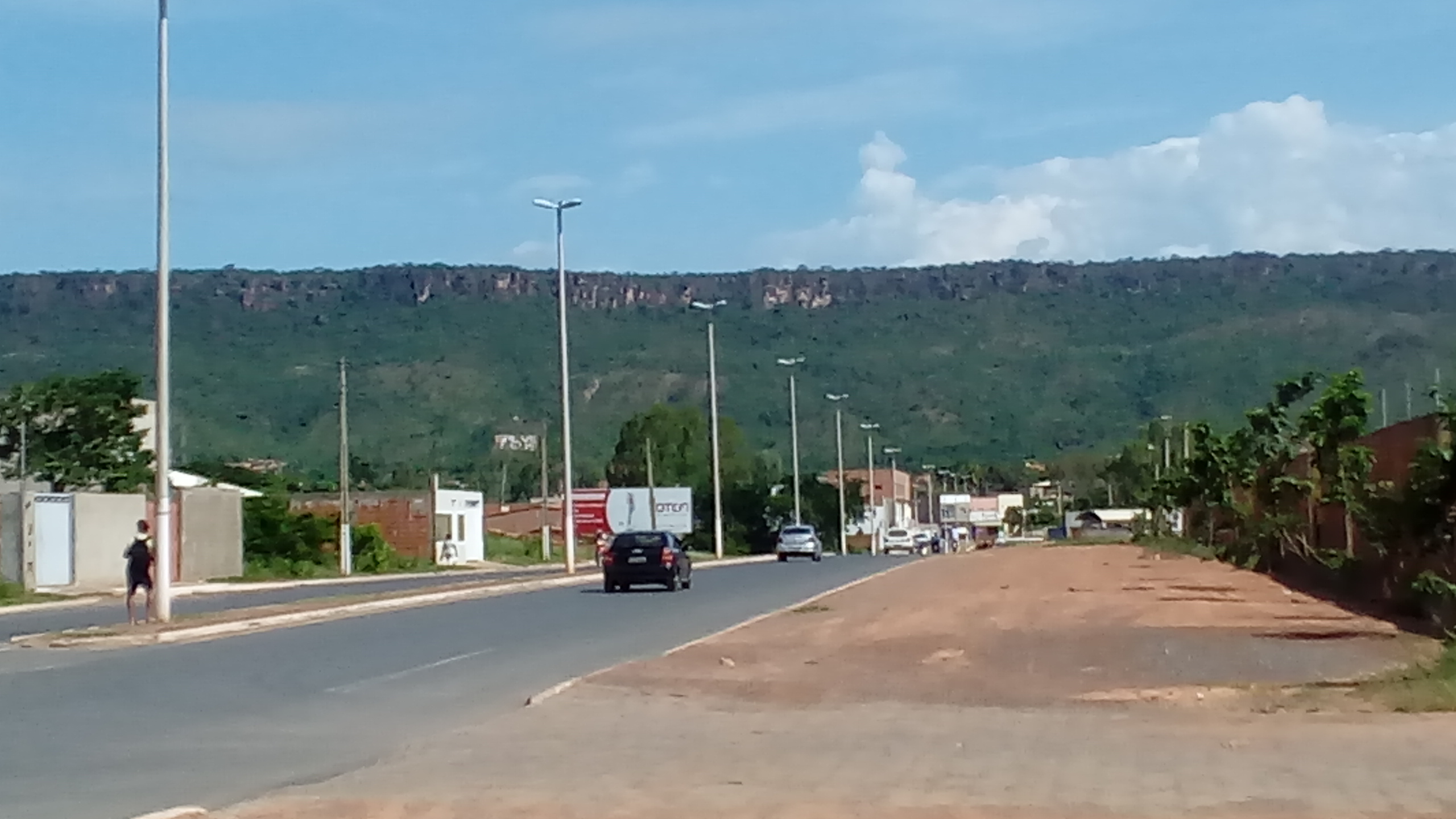 Principal via de acesso ao Hospital do Oeste e ao loteamento parque da cidade. Ao fundo a Serra da Bandeira.